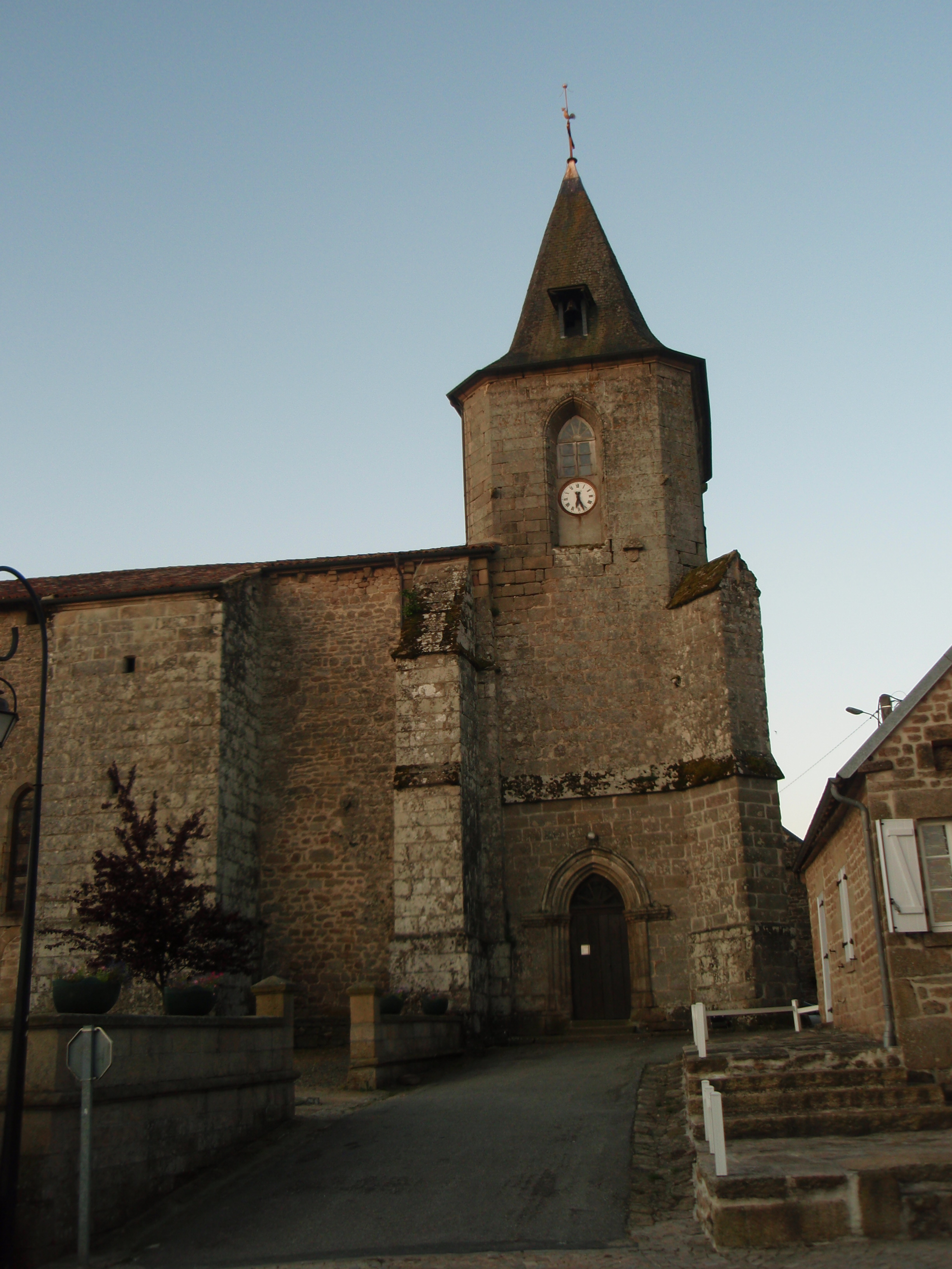 Église Saint-Germain à Royère de Vassivière en Creuse (France)